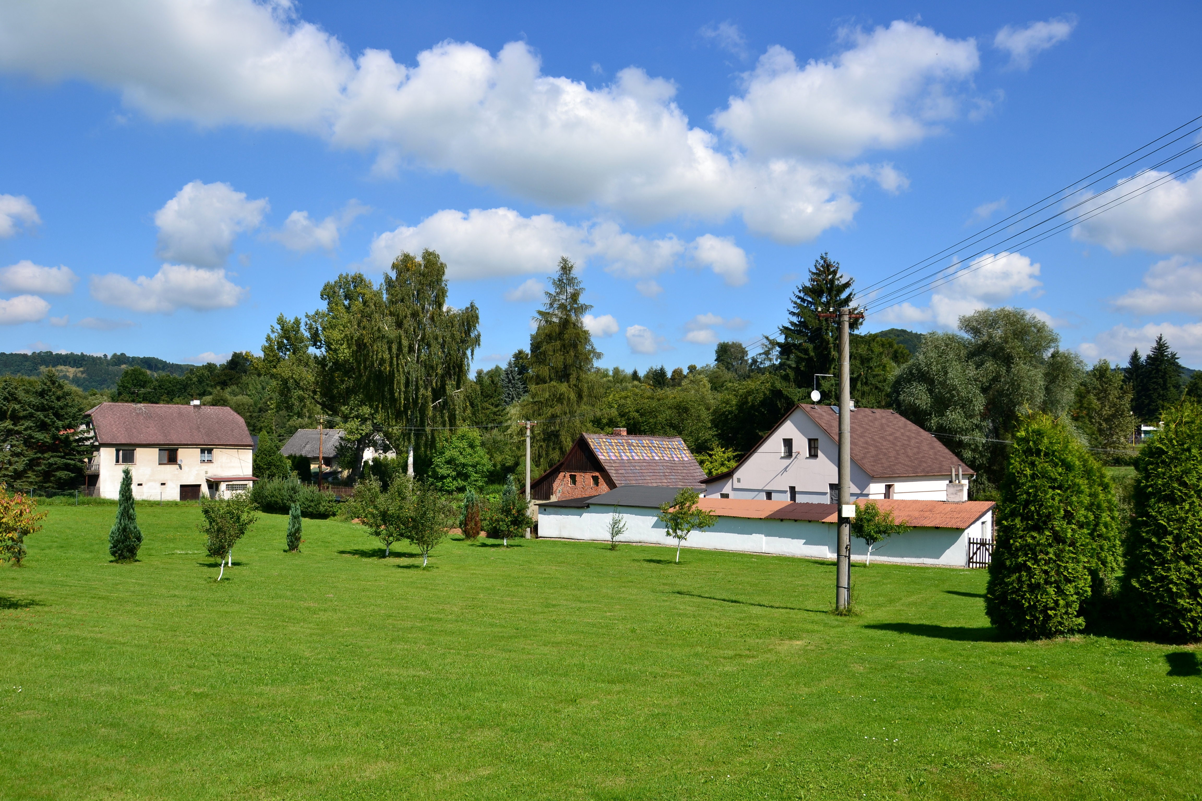 Dům čp. 10